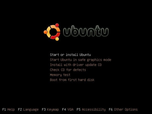 captura de pantalla de la pantalla de boot del live cd de ubuntu